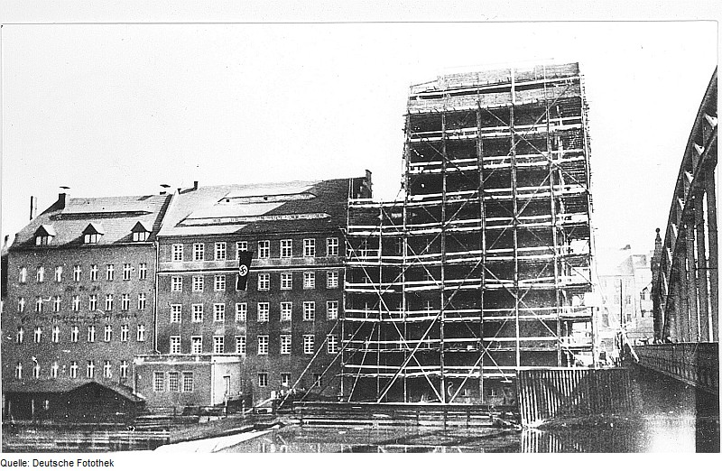 Original image description from the Deutsche Fotothek Görlitz. Dreiradenmühle, Bau des Getreidesilos, 20.3.1938 (Stadtarchiv Görlitz, Bildersammlung)